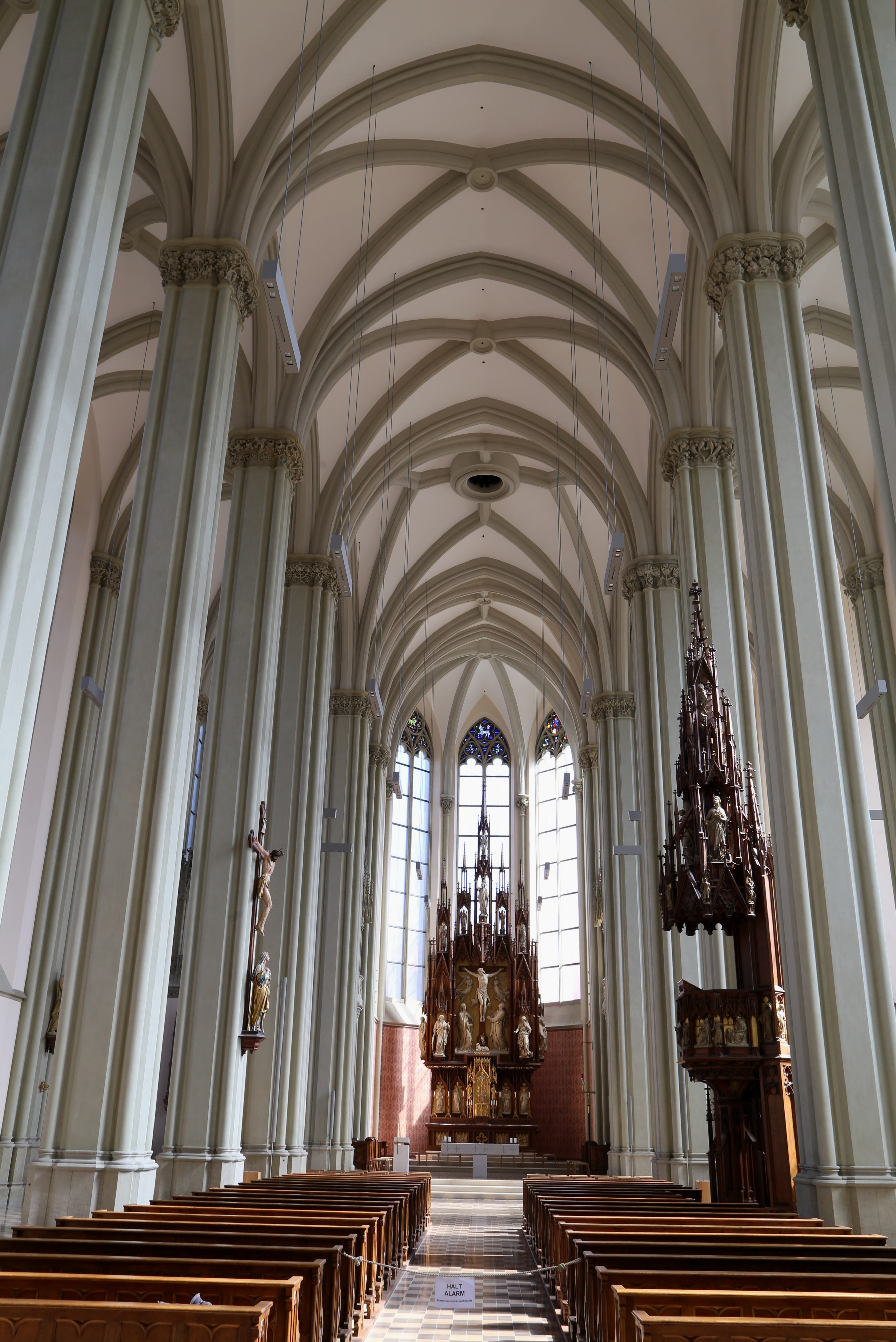 Heilig-Kreuz-Kirche, Giesing, München